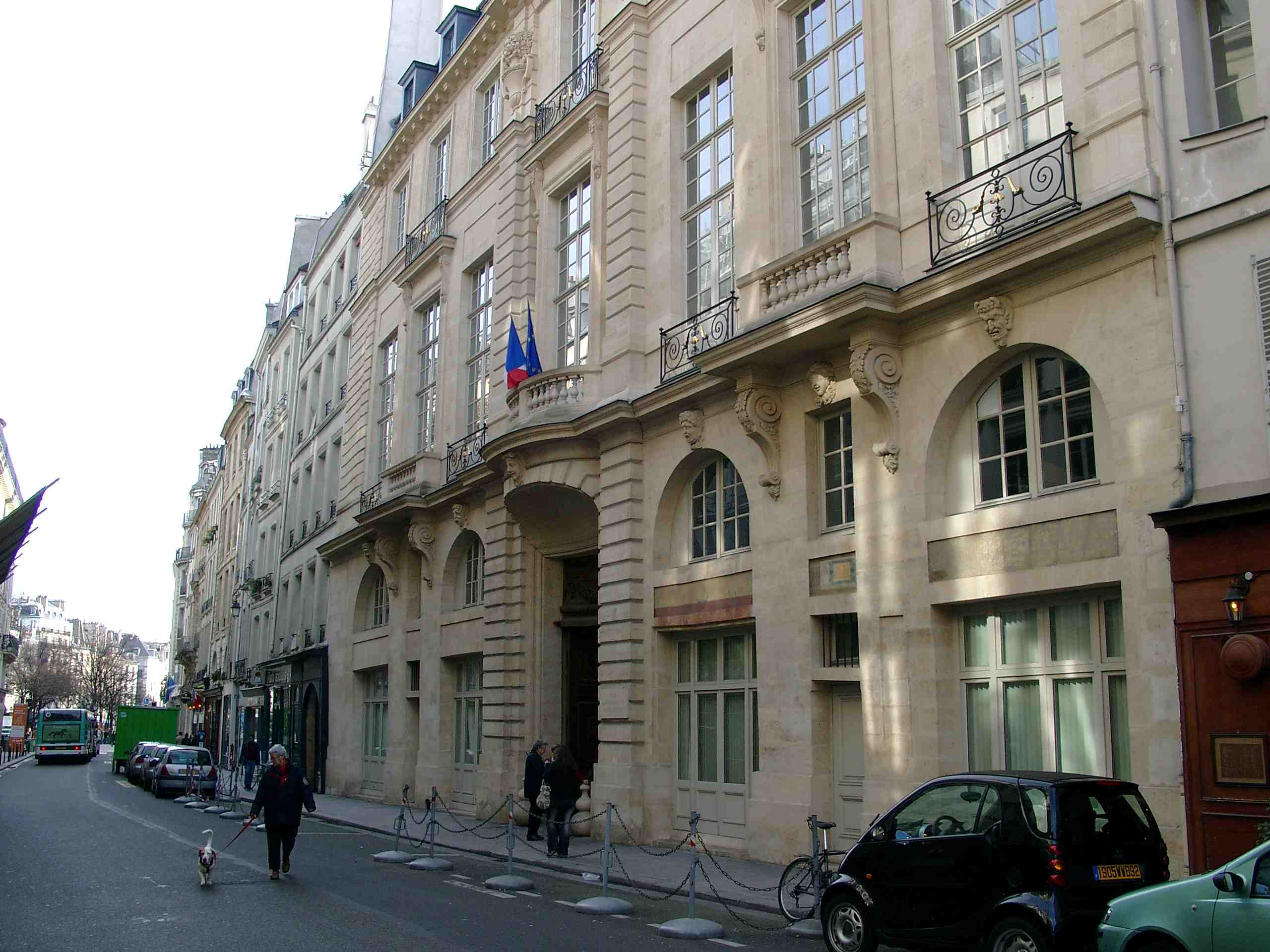 Front of Hôtel de Beauvais (68, rue François-Miron, Paris, 4. Arrondissement)